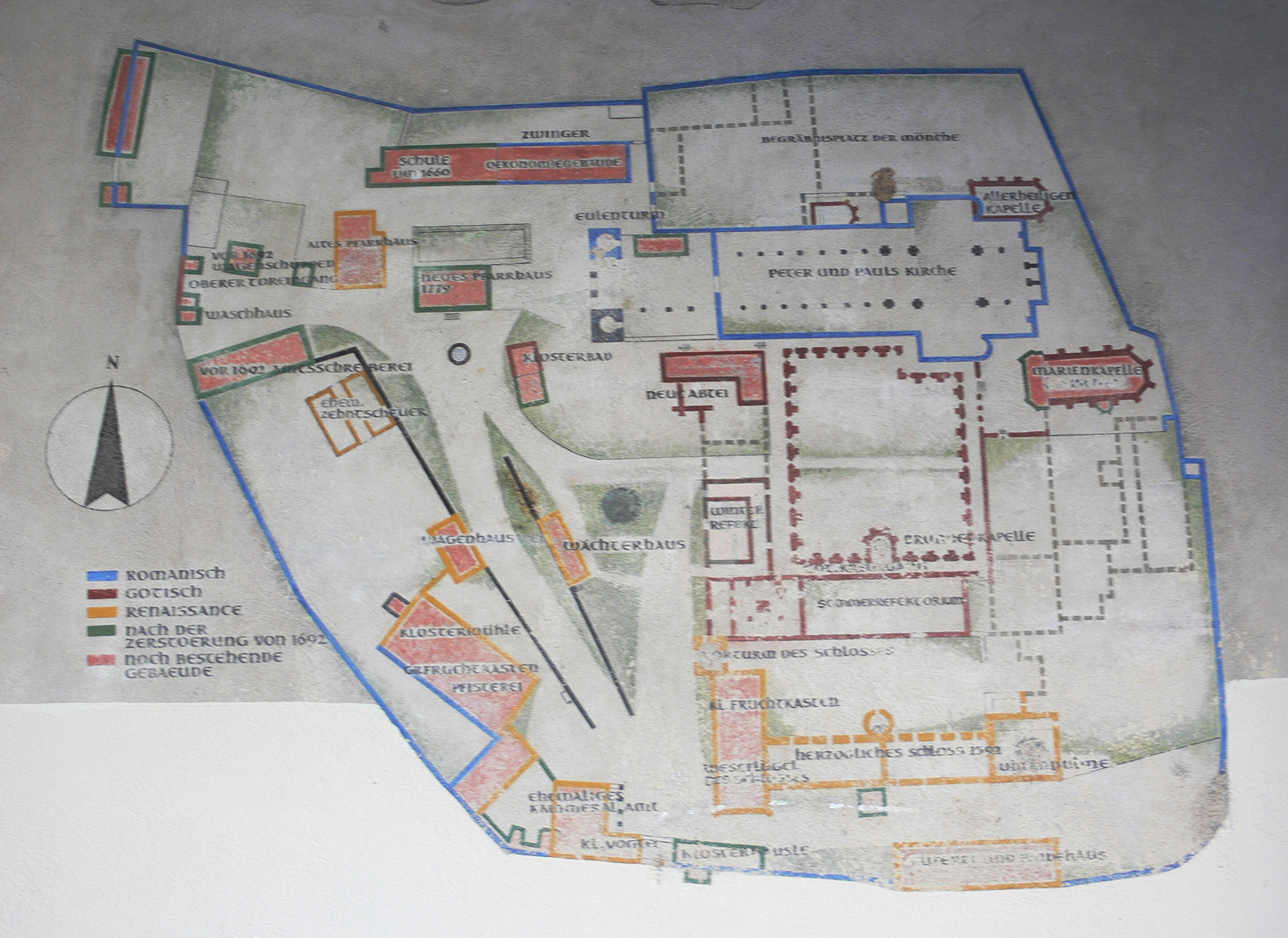 Ehem. Kloster St. Peter und Paul Hirsau, Calw: Karte mit Kennzeichnung der Bauepochen